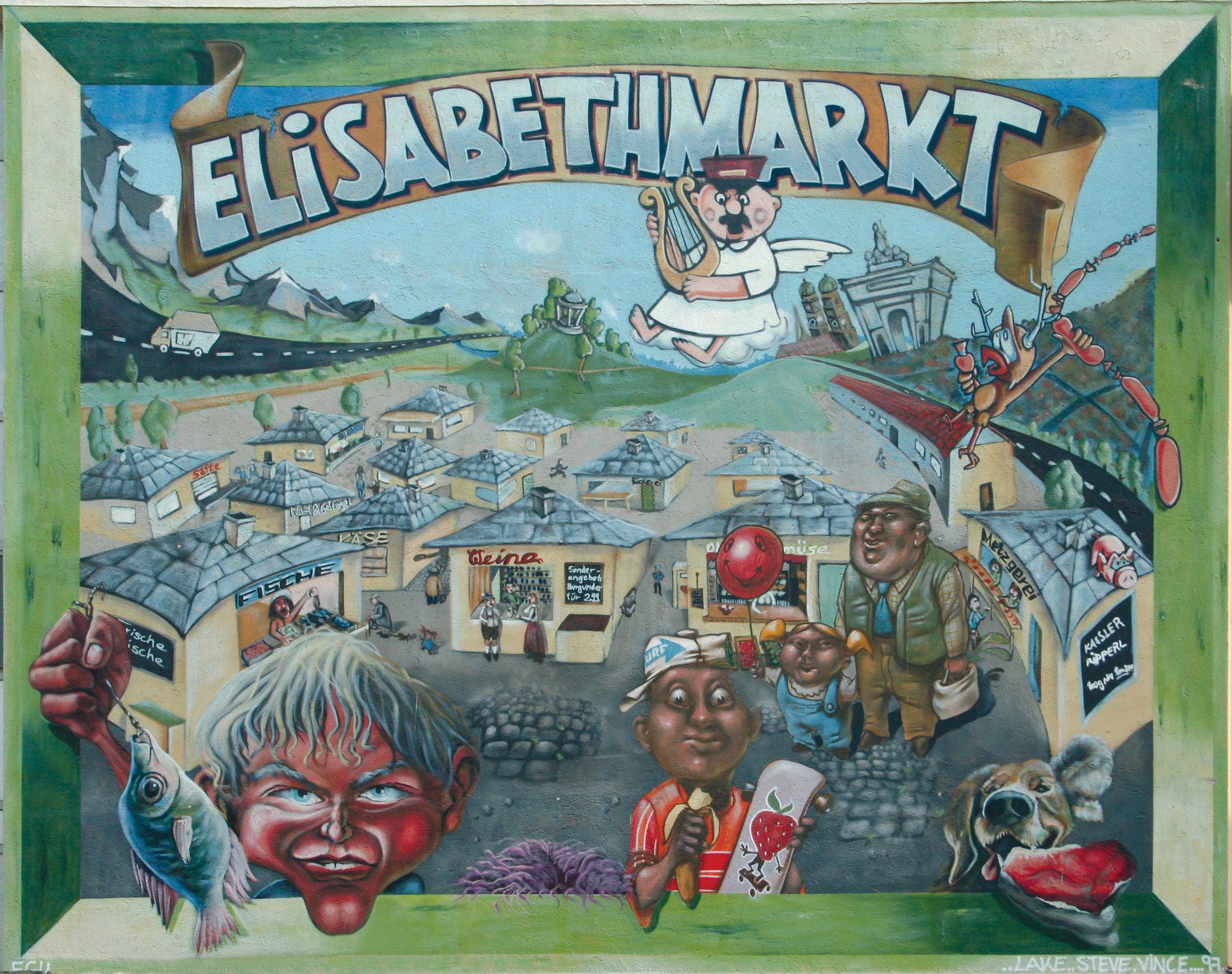 Graffiti an der Wand zum Elisabethmarkt in München. Original: image:Elisabethmarkt Muenchen Graffiti 1.jpg